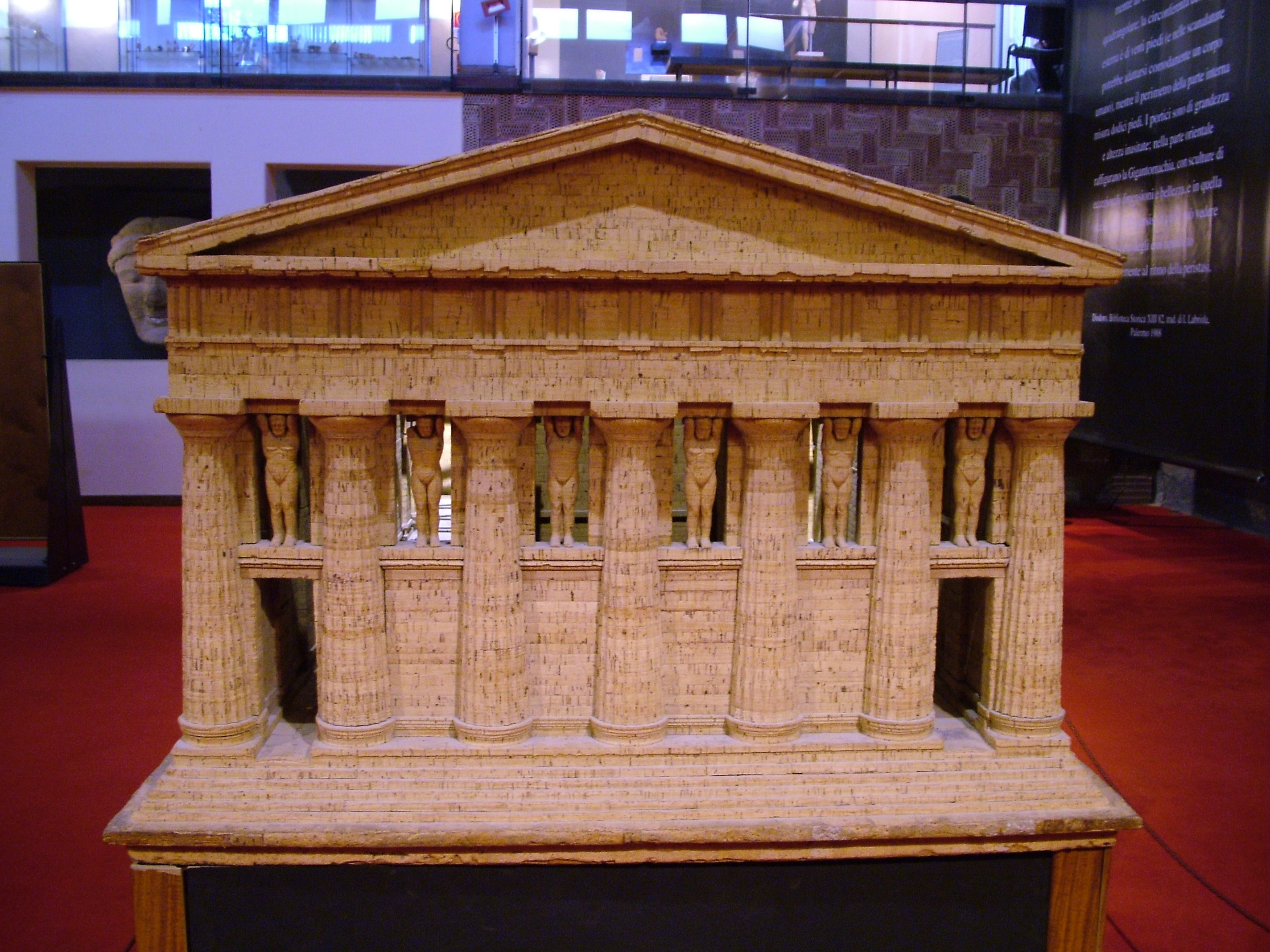 Agrigent, im Museum ein Model des Zeus-Tempels mit Lage der Atlanten.